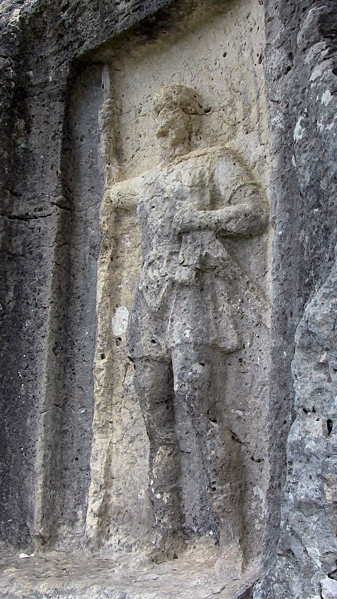 Yeniyurt Kale, hellenistischer Festungsbau nördlich von Erdemli im Rauhen Kilikien, Südtürkei, Kriegerrelief